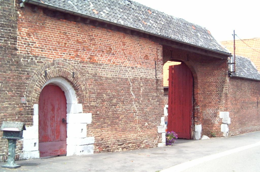 Limburgs: Haof in Rule, Rullen in de gemeinte Voere in Belsj. foto: Els Diederen 2006 Aelske